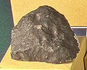 Holbrook meteorite, 79.2 g